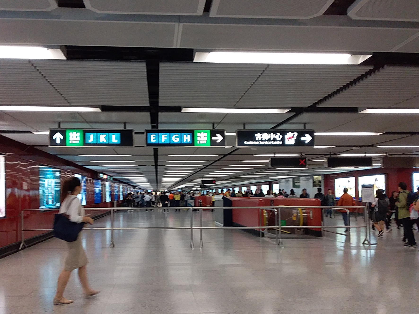 2019年3月18日，港鐵職員於列車相撞事故後，將中環站L2層架起鐵馬，暫時圍封遮打道大堂部份範圍，以免乘客前往L3層之荃灣綫月台。